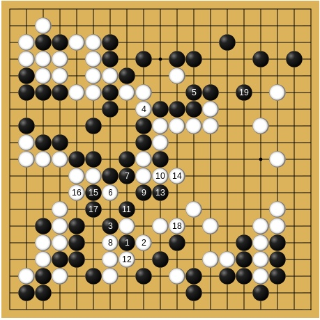 2018年1月5日 第2回Mlily夢百合杯世界囲碁オープン戦決勝五番勝負第5局 李世乭-柯潔(先番) 113-131手